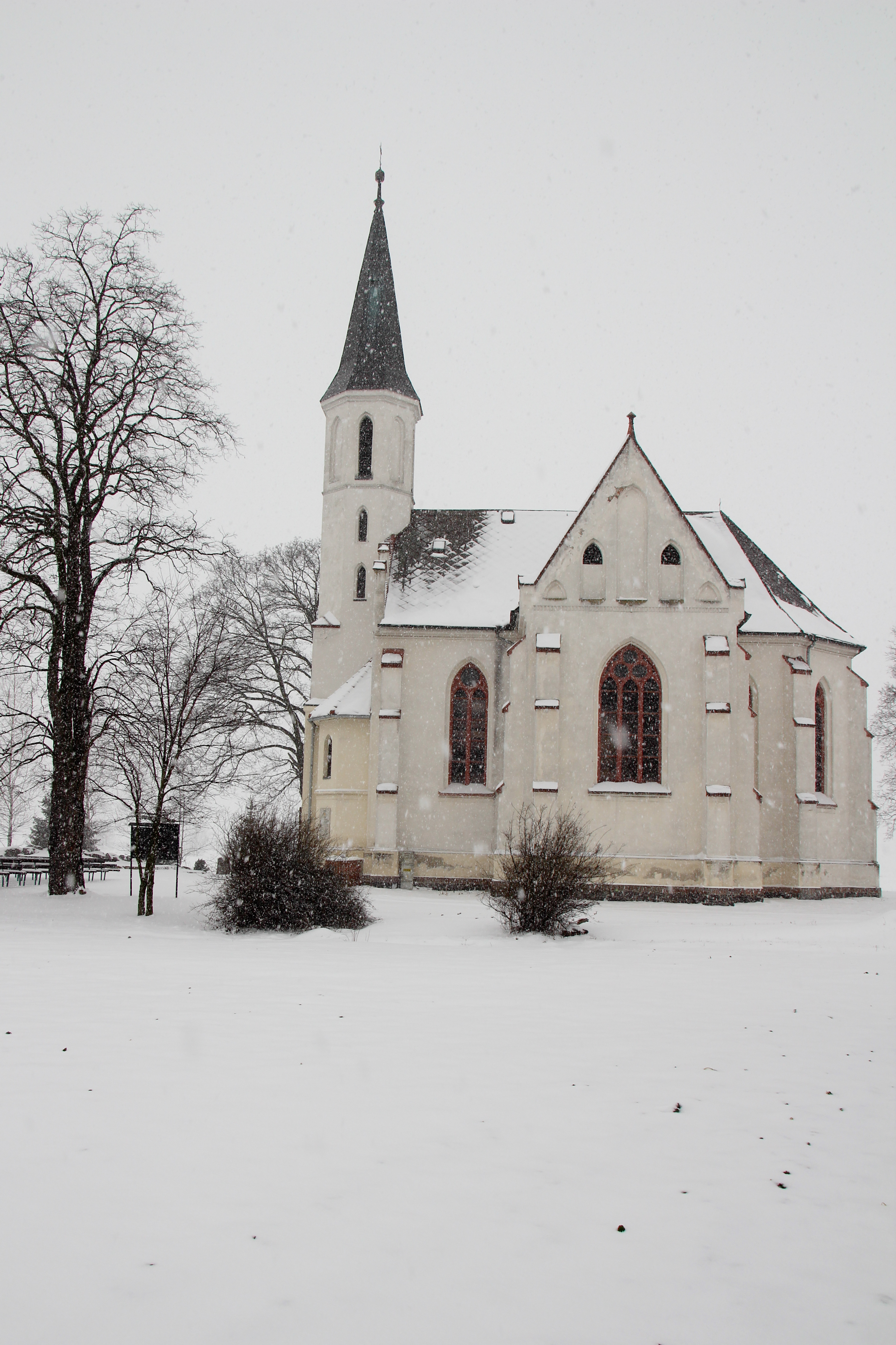 Sidzina - rzymskokatolicki kościół pw. Znalezienia Krzyża Świętego i MB Częstochowskiej